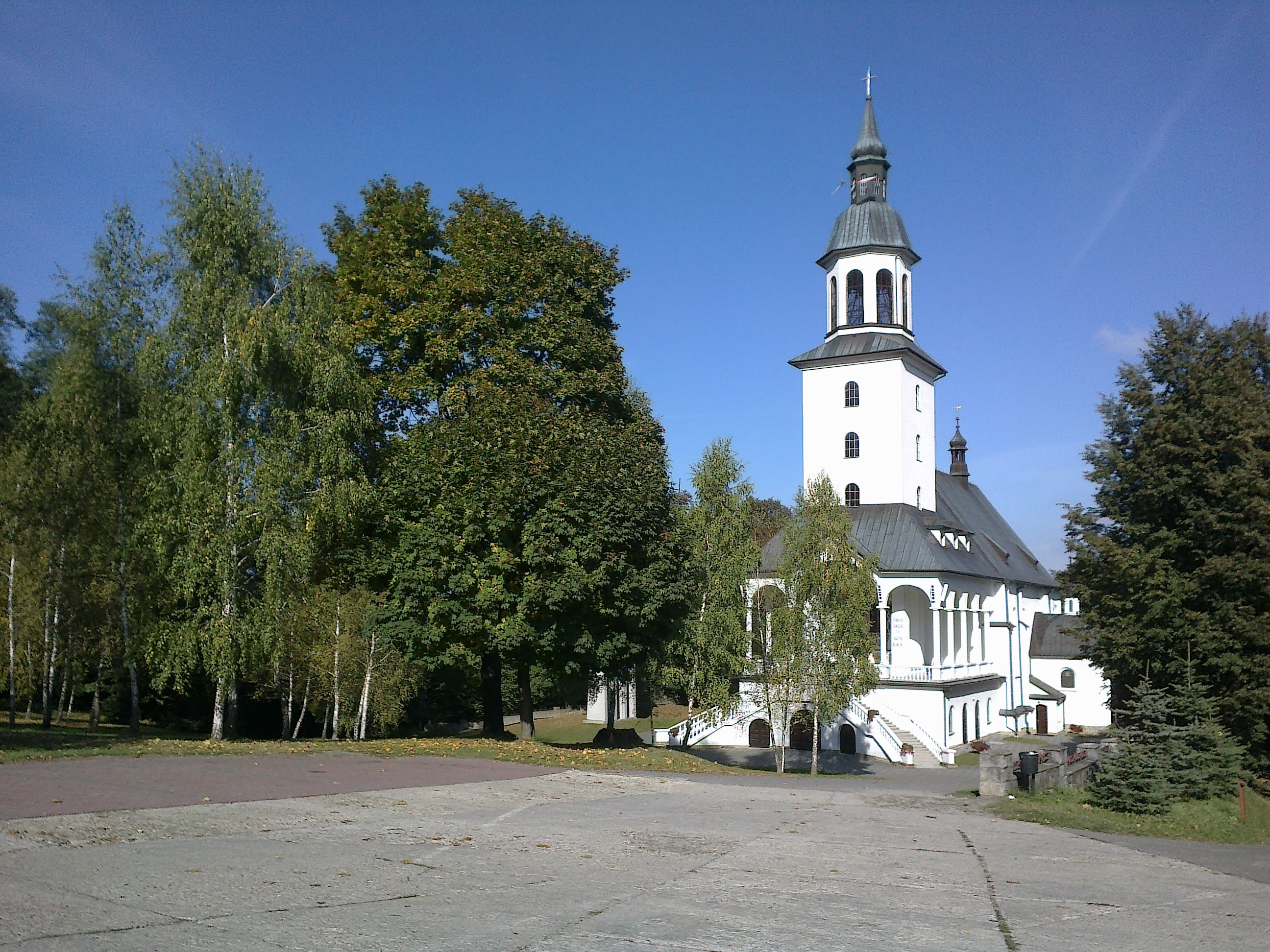 Zawada, kościół par. p.w. Narodzenia NMP, 1646, XIX, 1956, 1991